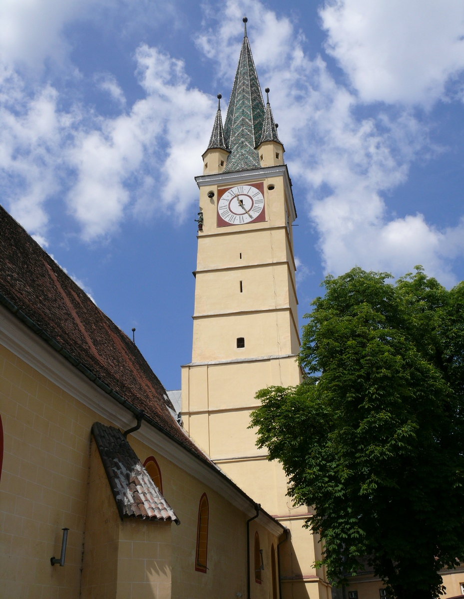 Ansamblul bisericii evanghelice fortificate ("Castelul")